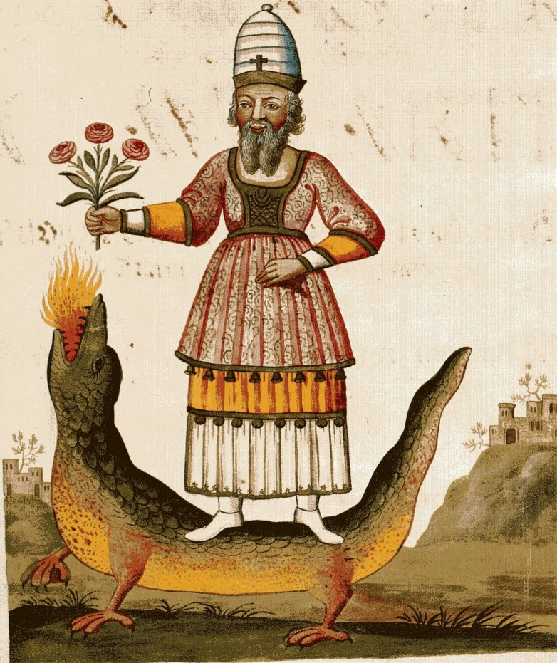 Immagine del manoscritto Zoroaster Clavis Artis, MS. Verginelli-Rota, Biblioteca dell'Accademia Nazionale dei Lincei, Roma, vol. 1, pag. 3r